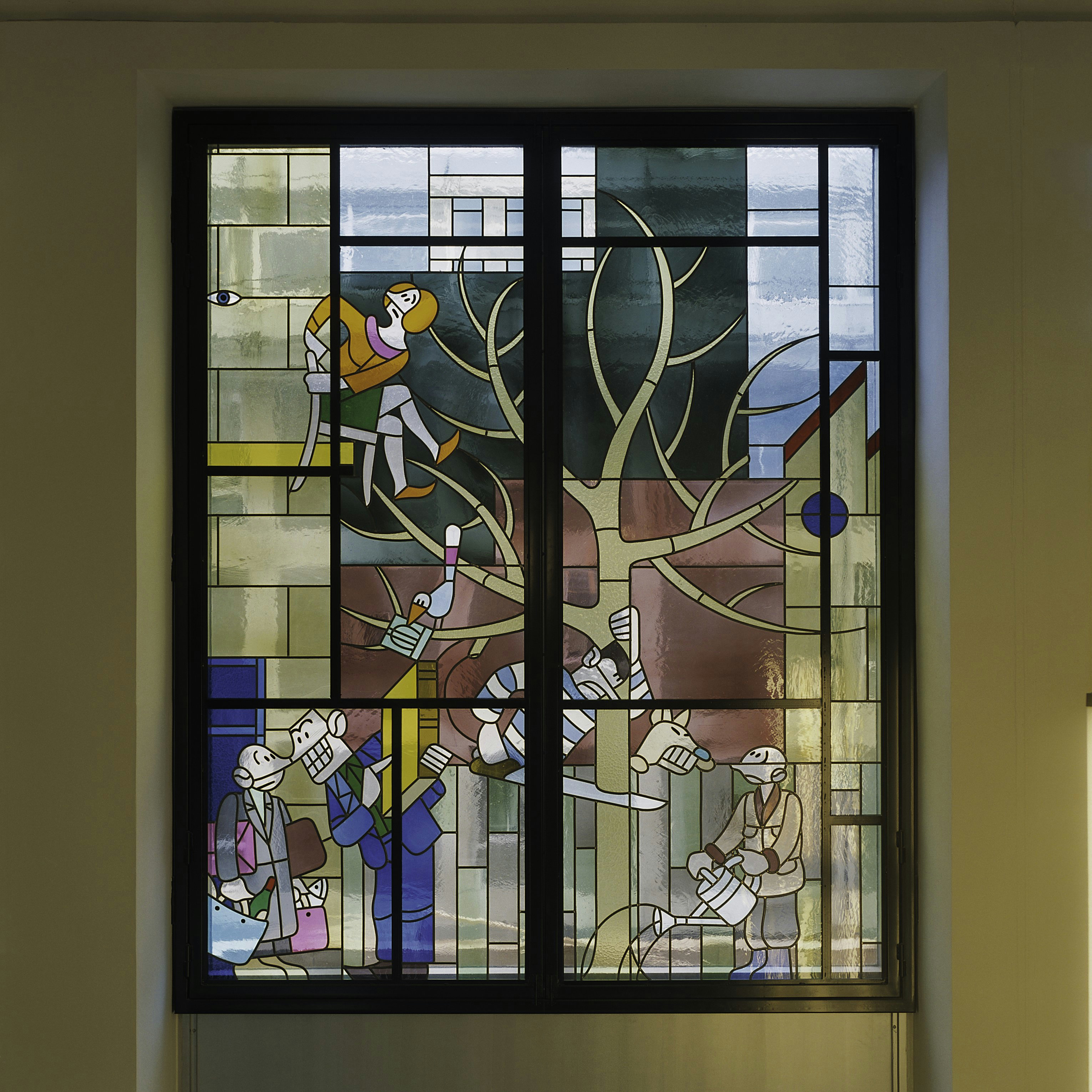 Paleis van Justitie: Interieur, overzicht van een glas in loodraam in de centrale hal, van de striptekenaar Joost Swarte